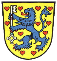 Wapen vun den Landkreis Horborg in Neddersassen, Düütschland.